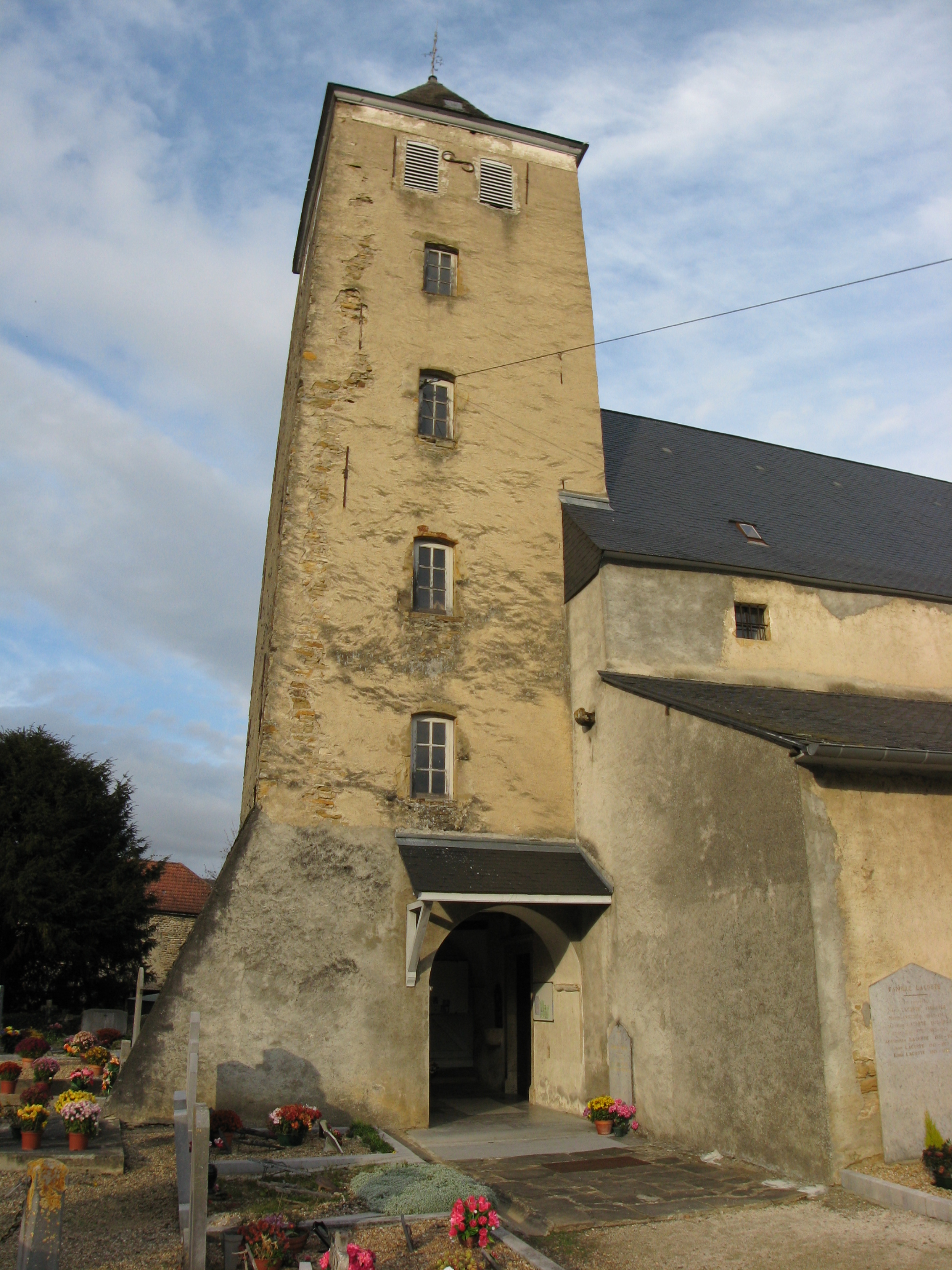 Porche de l'église Saint Laurent de Géronce (Pyrénées-Atlantiques) (Pyrénées).